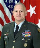 LTG William G Boykin